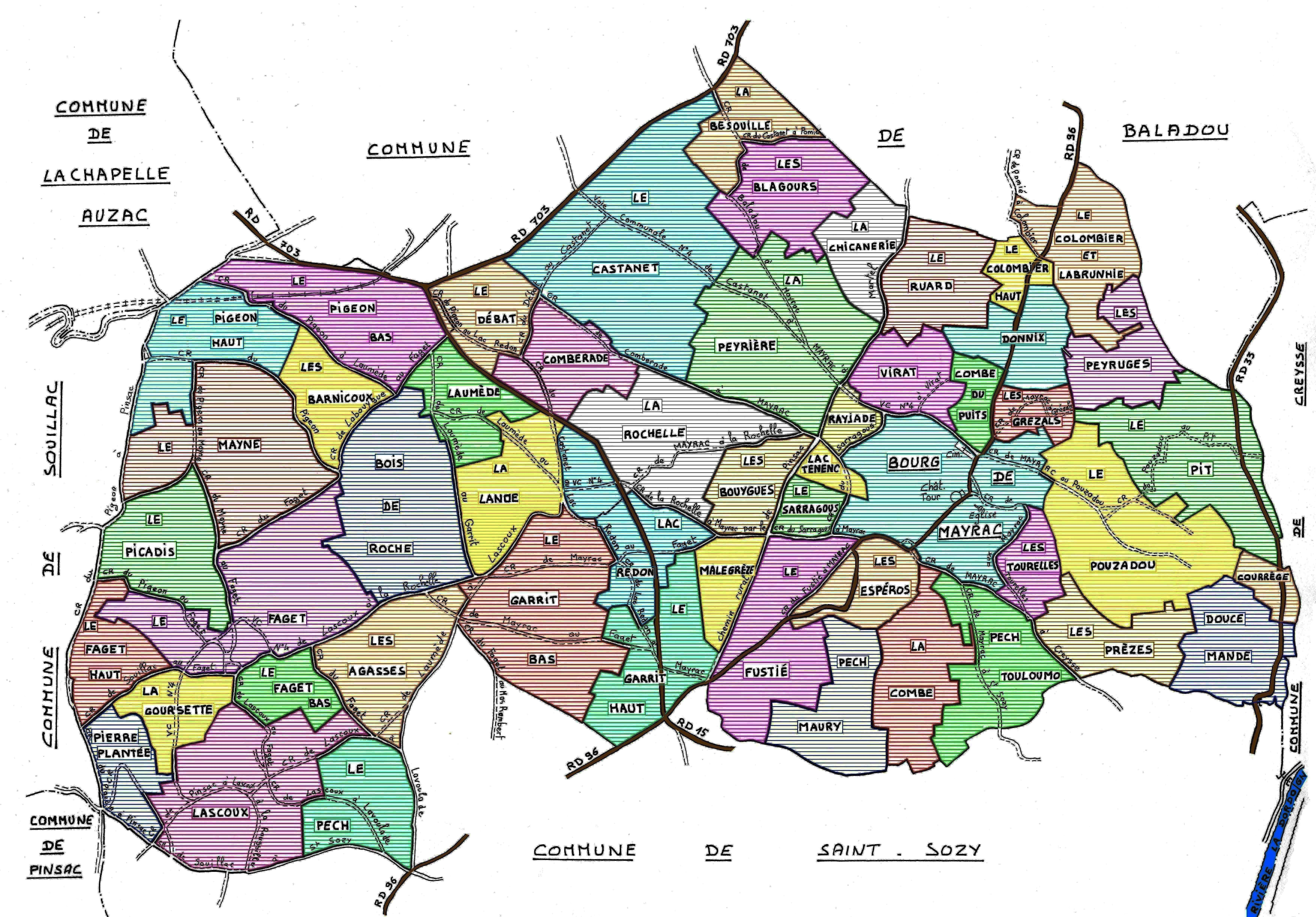 Carte de la commune de Mayrac (Lot, France) situant chaque hameau et lieu-dit